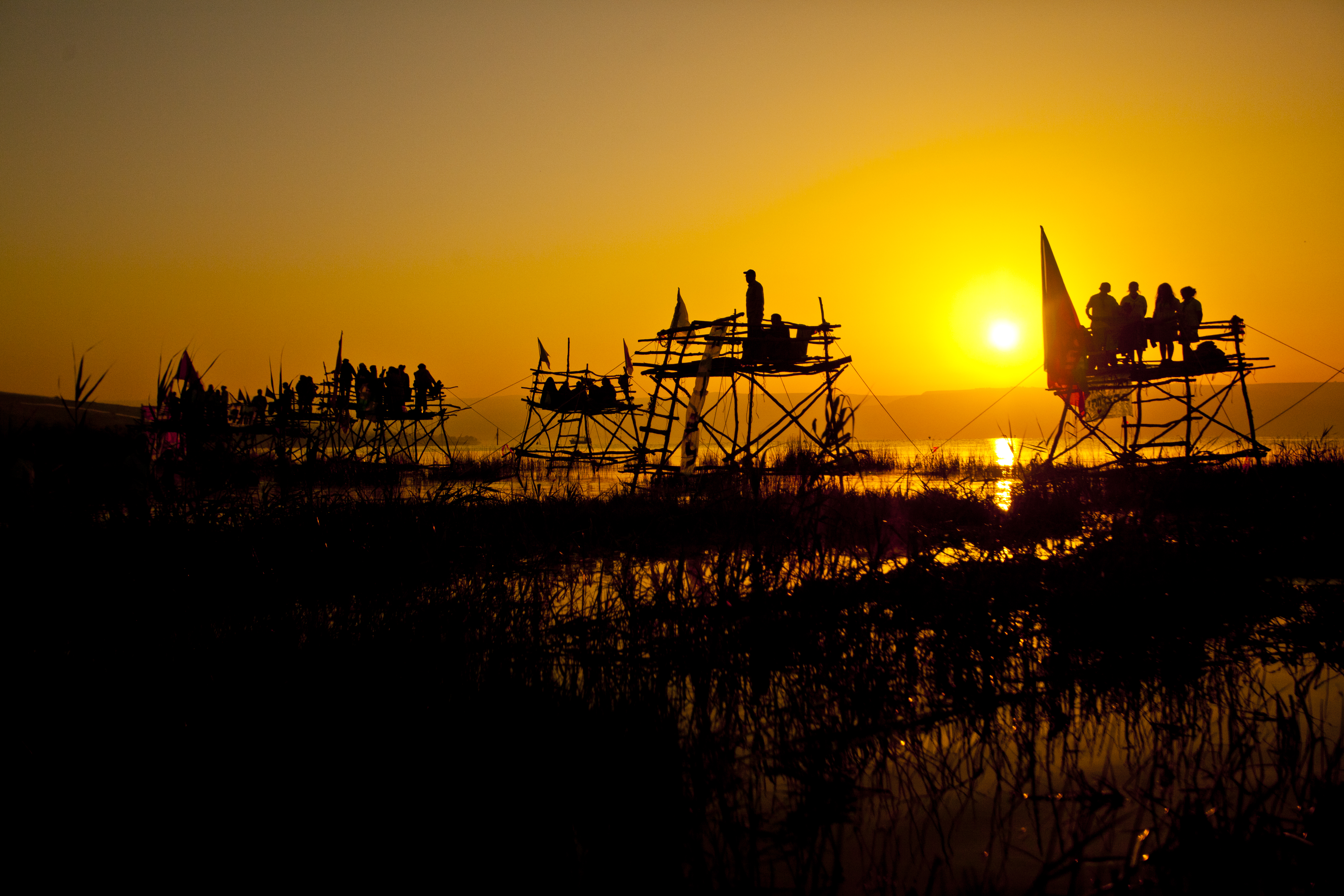 טקס הבטחה צופית בכנרת - תנועת הצופים, הנהגת ירושלים